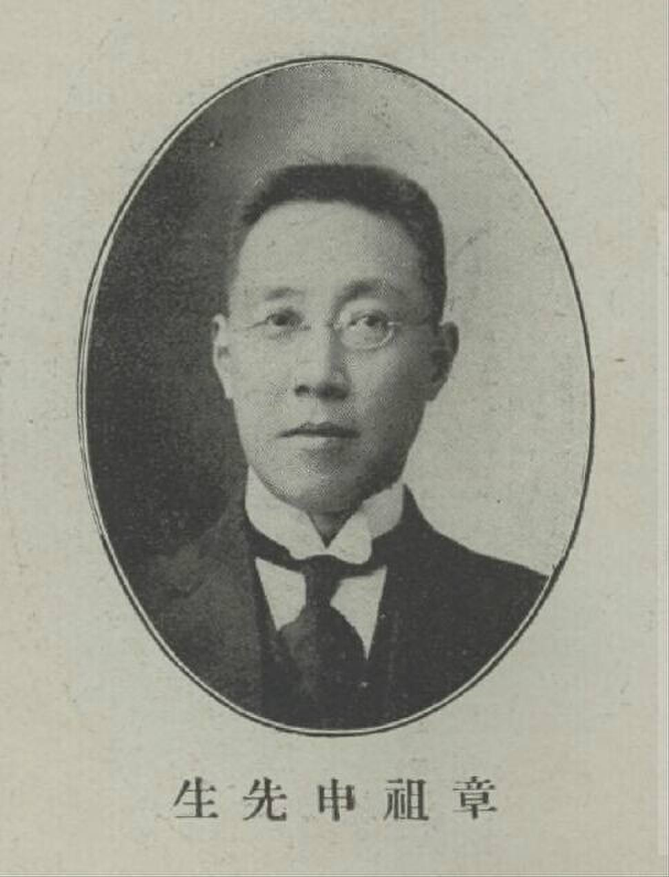 章祖申（1879年－1925年），字苣生，號無可[1]，又號篴漁[2]，浙江烏程（今屬吳興區）人，清末民初外交官。